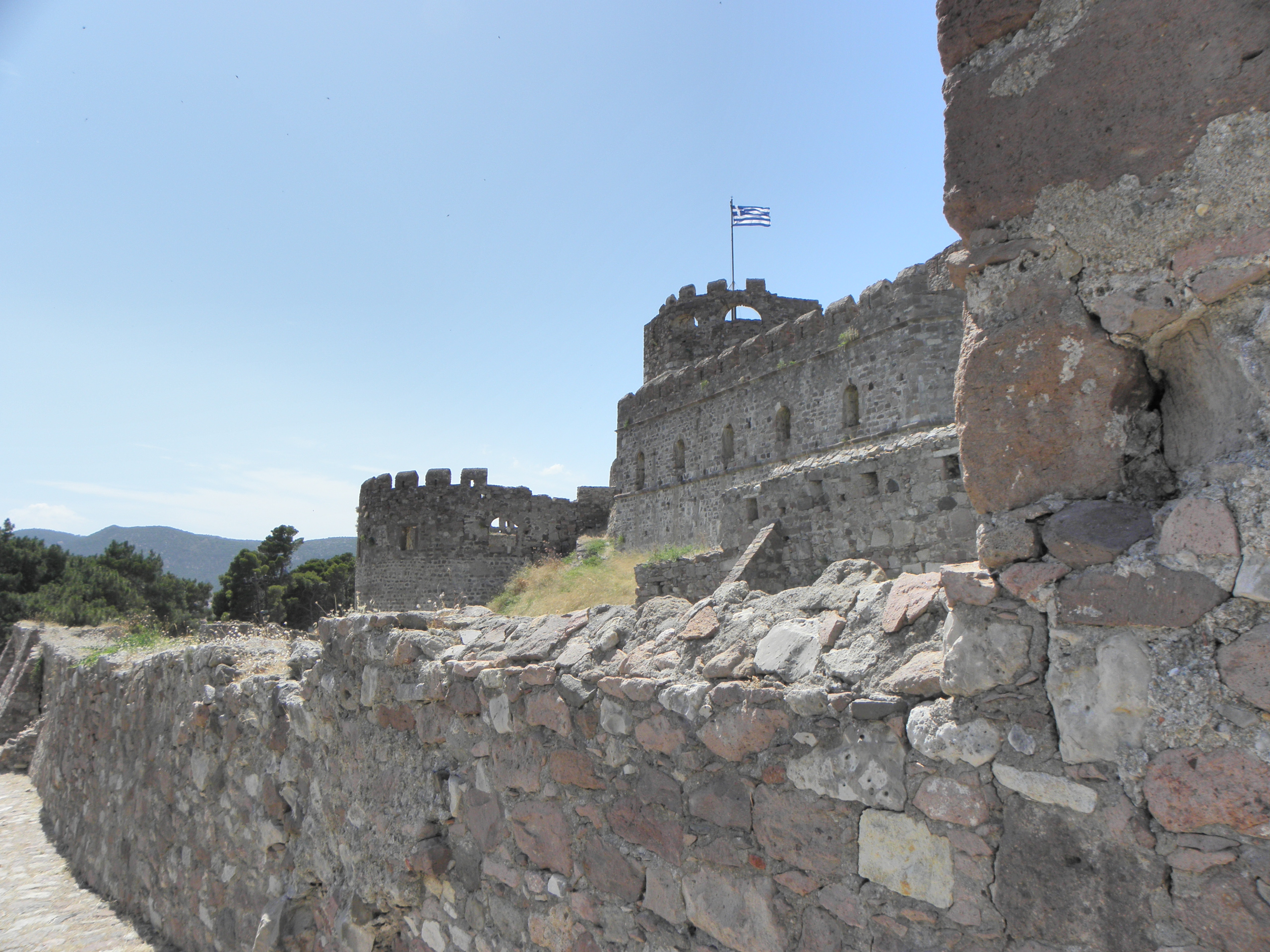 Pevnost v Mytiléně, Lesbos